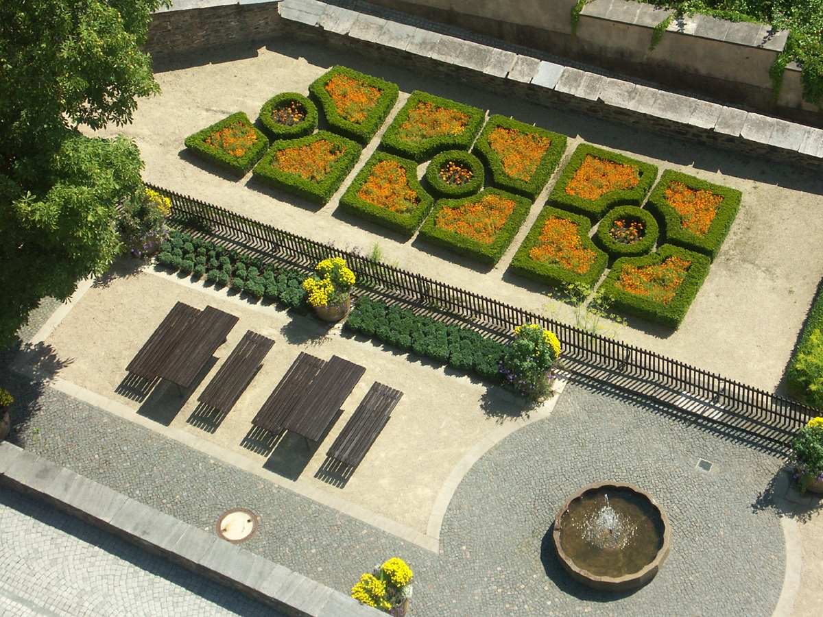 Schloß Wildeck in Zschopau: Terrasse und Barockgarten vom Bergfried gesehen